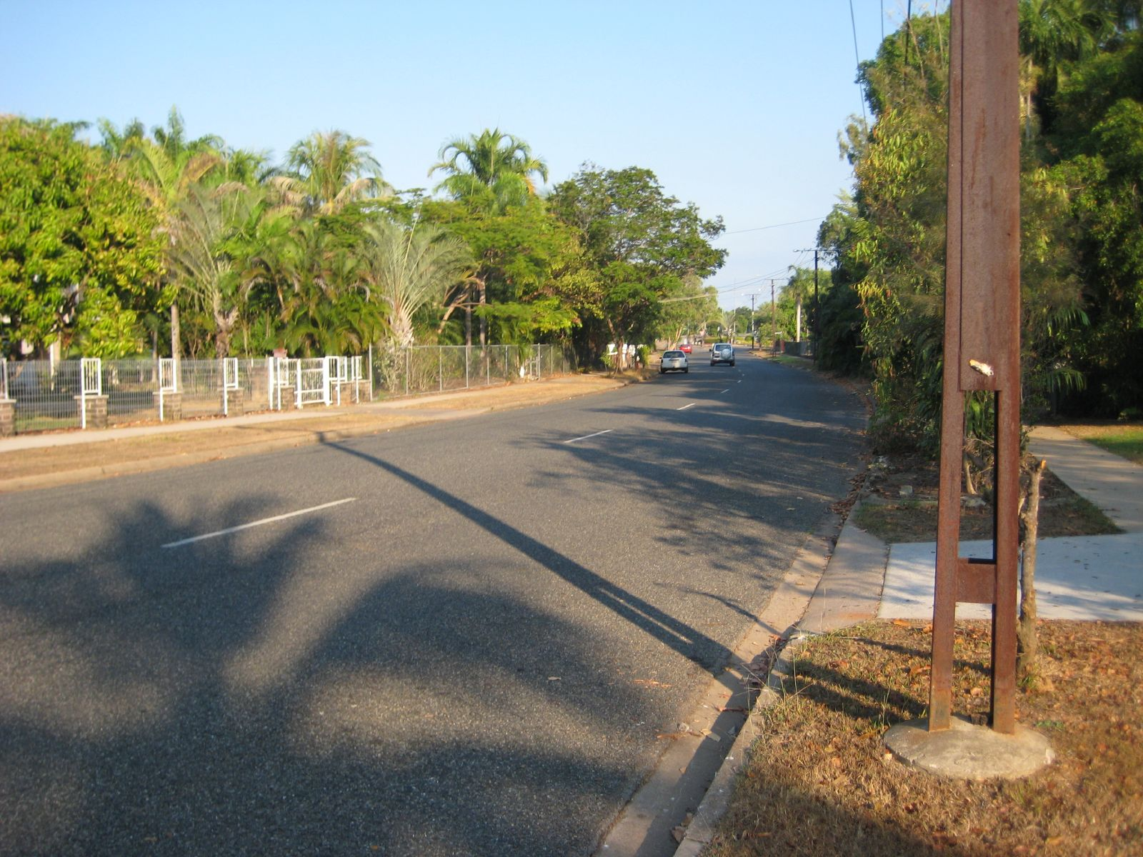 Buchanan Terrace in Nakara, NT.